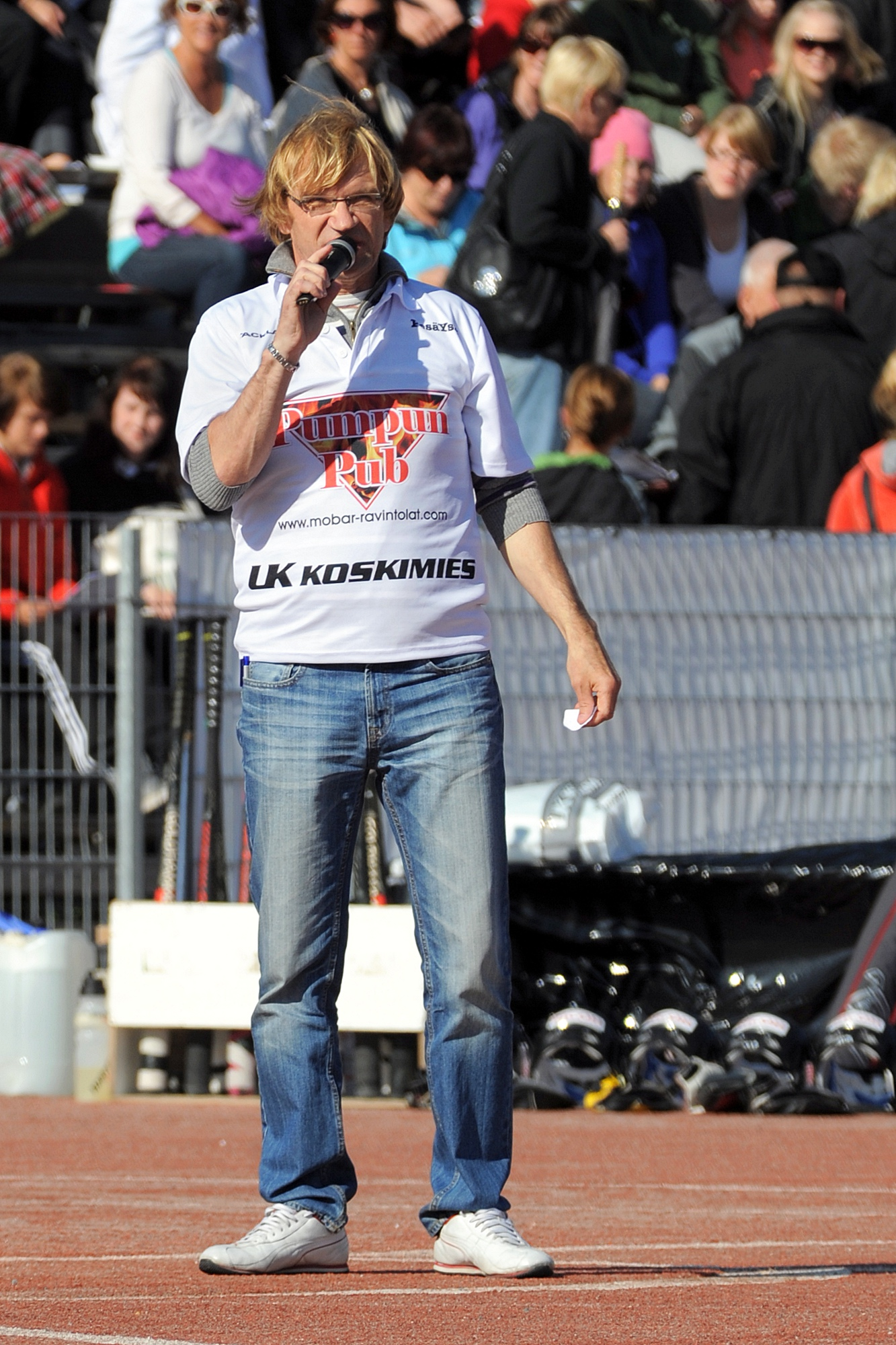 Antero Mertaranta selostaa naisten pesäpallo-ottelua Lappeenrannassa 21.6.2011.